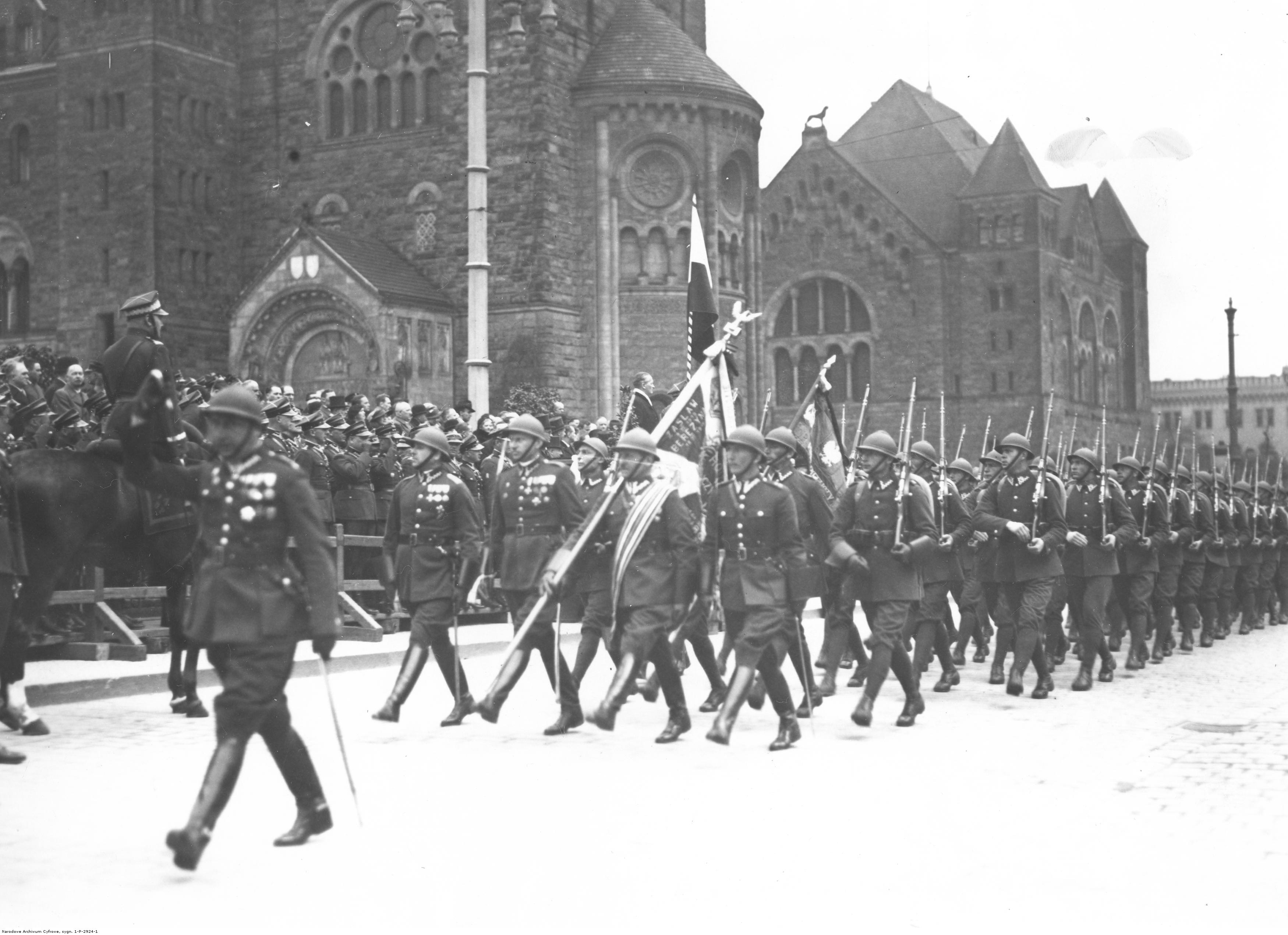 Święto Narodowe Trzeciego Maja – uroczystości w Poznaniu w 1936 r. Defilada oddziałów 57 Pułku Piechoty Wielkopolskiej przed Zamkiem Cesarskim. Widoczne poczty sztandarowe. Koncern Ilustrowany Kurier Codzienny - Archiwum Ilustracji. Sygnatura: 1-P-2924-1